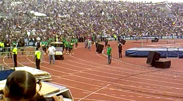 Mas de 20 mil personas en el entrenamiento del Club De Futbol Monterrey